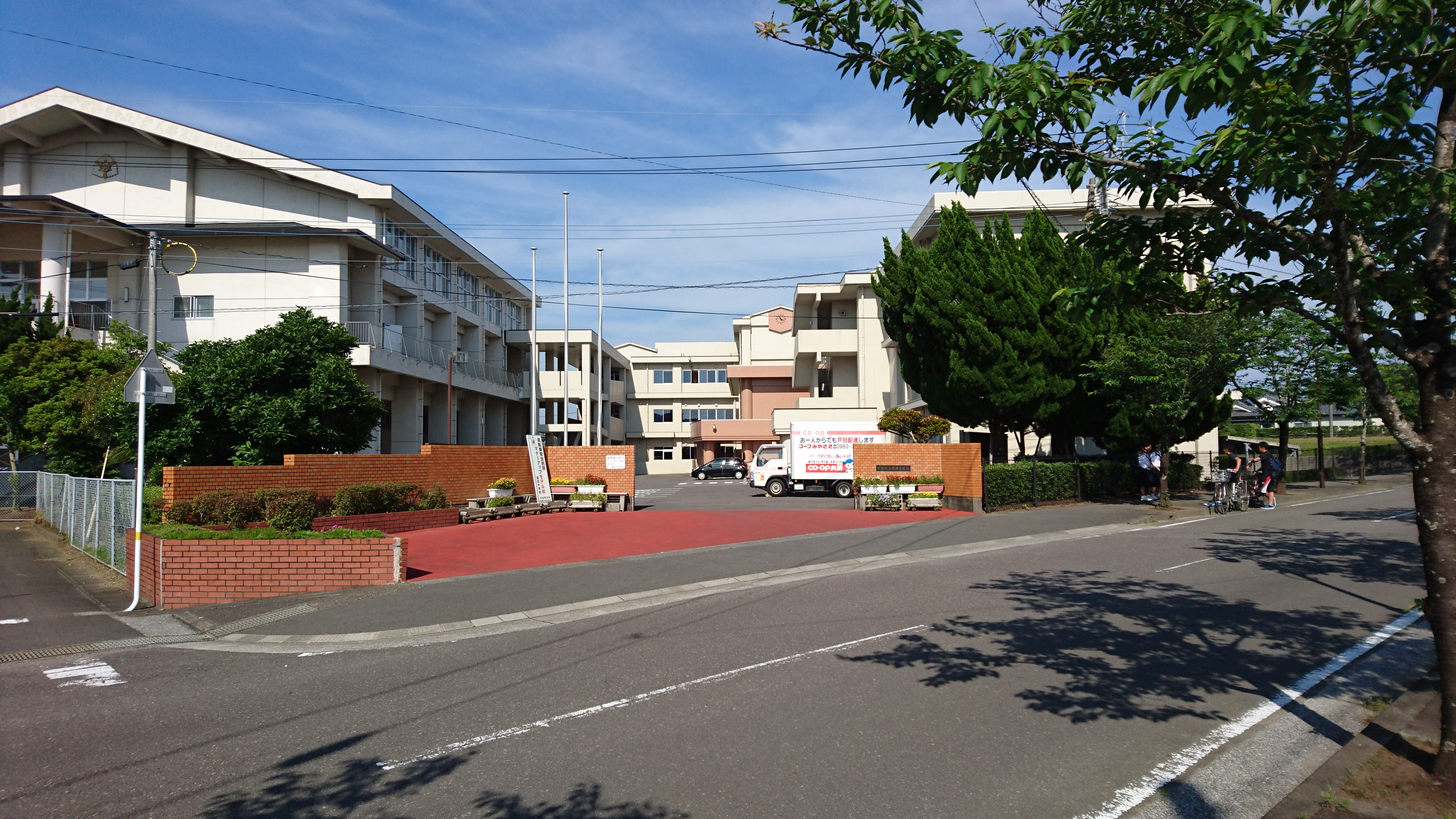 新富町立富田中学校正門